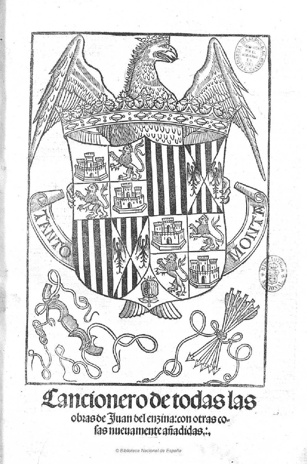 Cancionero de todas las obras de Juan del enzina : con otras cosas nueuamente añadidas Autor: Encina, Juan del (1469-1529) Fecha: 1516 Datos de edición: En çaragoça por Jorge Coci